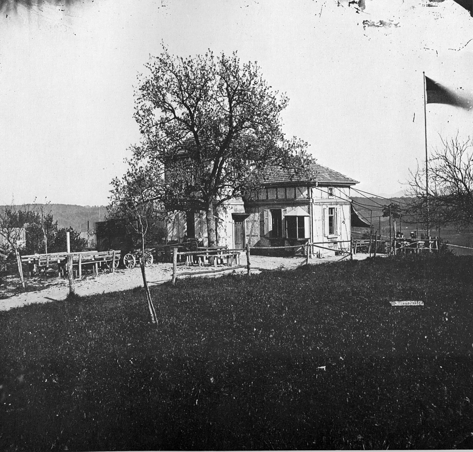 Die „Sennhütte“ auf dem Österberg, mit Paul Sinners Dunkelkammerwagen, 220 × 280 mm